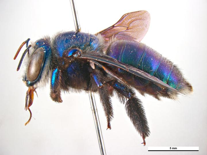 Xylocopa bombylans female